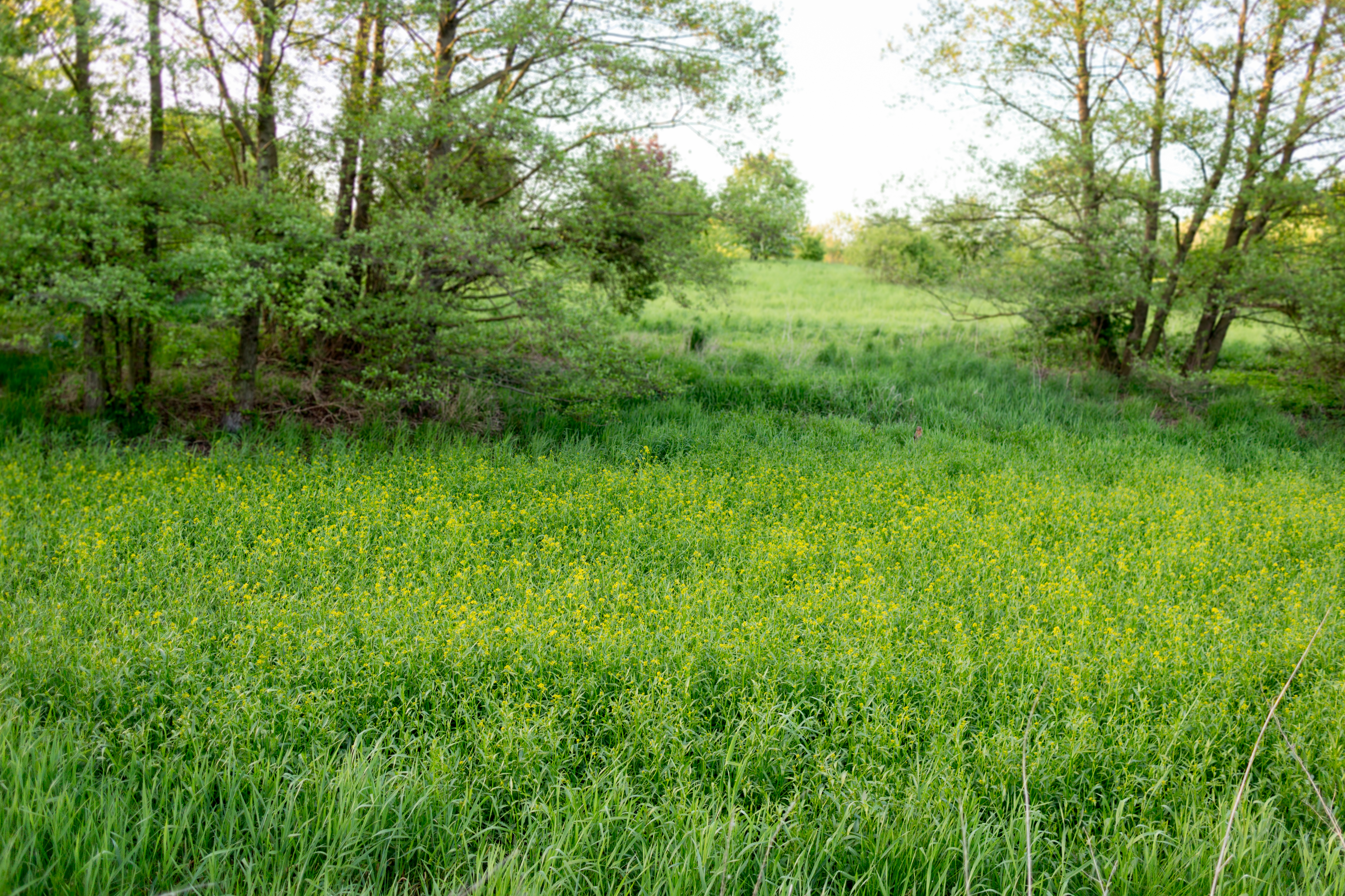 LSG Hönower Weiherkette - Krautweiher/Krautpfuhl